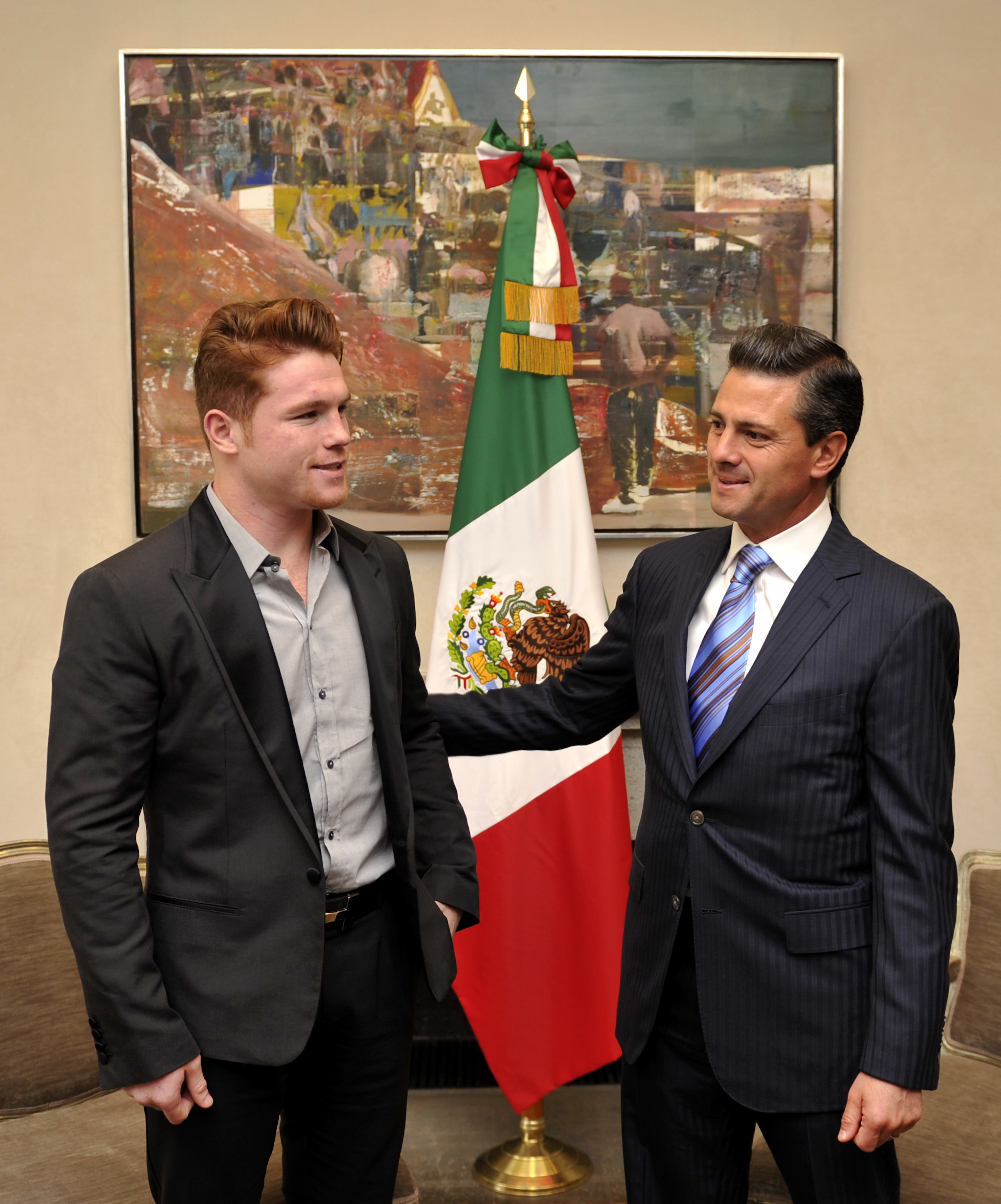 El Presidente Enrique Peña Nieto y el boxeador Saúl 'Canelo' Álvarez, durante un encuentro privado en la residencia oficial de los Pinos, 29ABRIL13.Visita del boxeador Residencia oficial "Los Pinos"